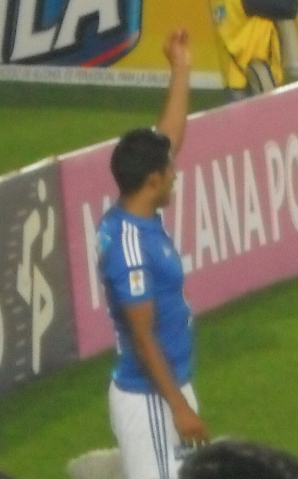 David Silva con Millonarios en el Campin.